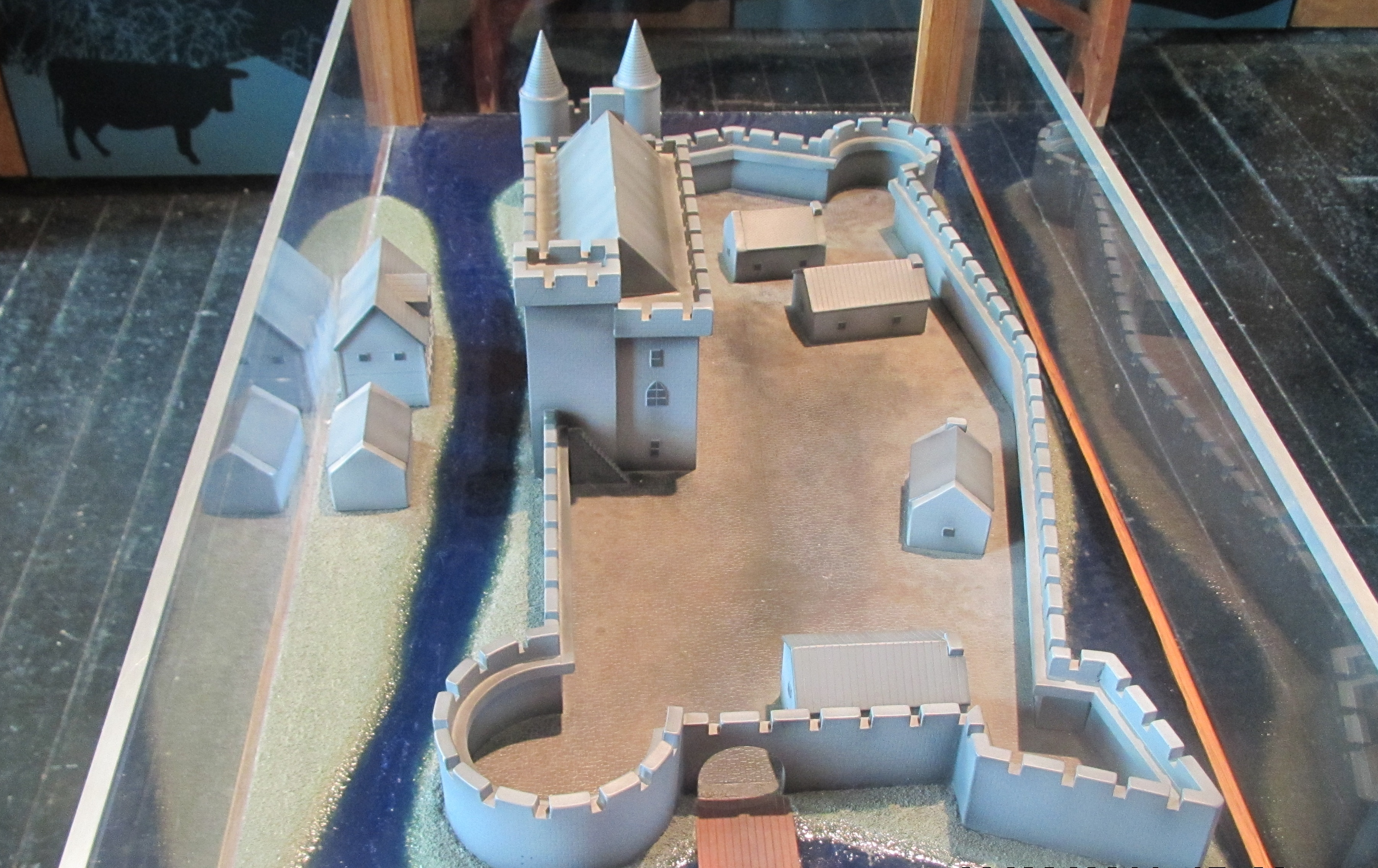 Enniskillen Castle3 by Paride.JPG